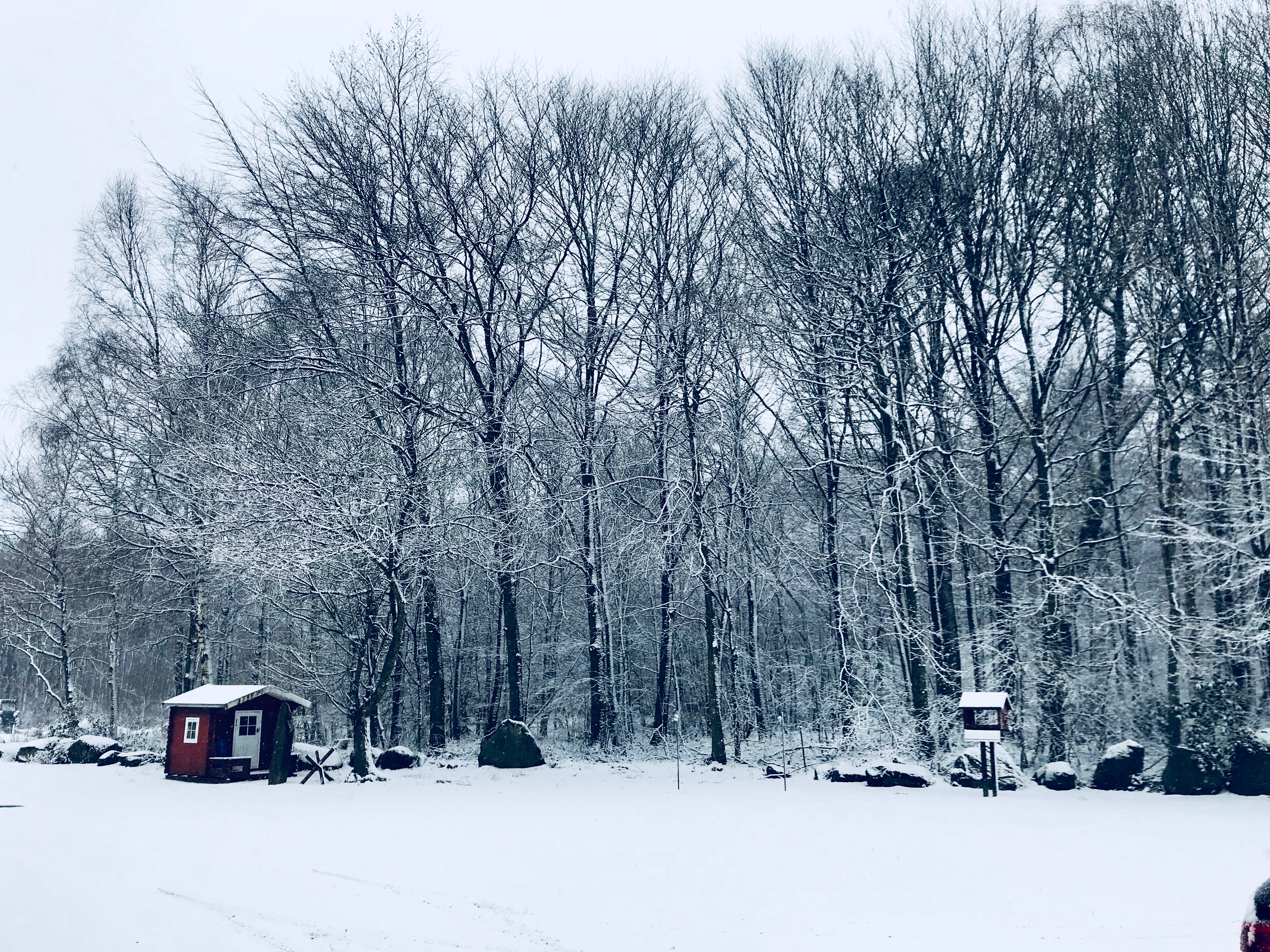 Winter på Fjeld